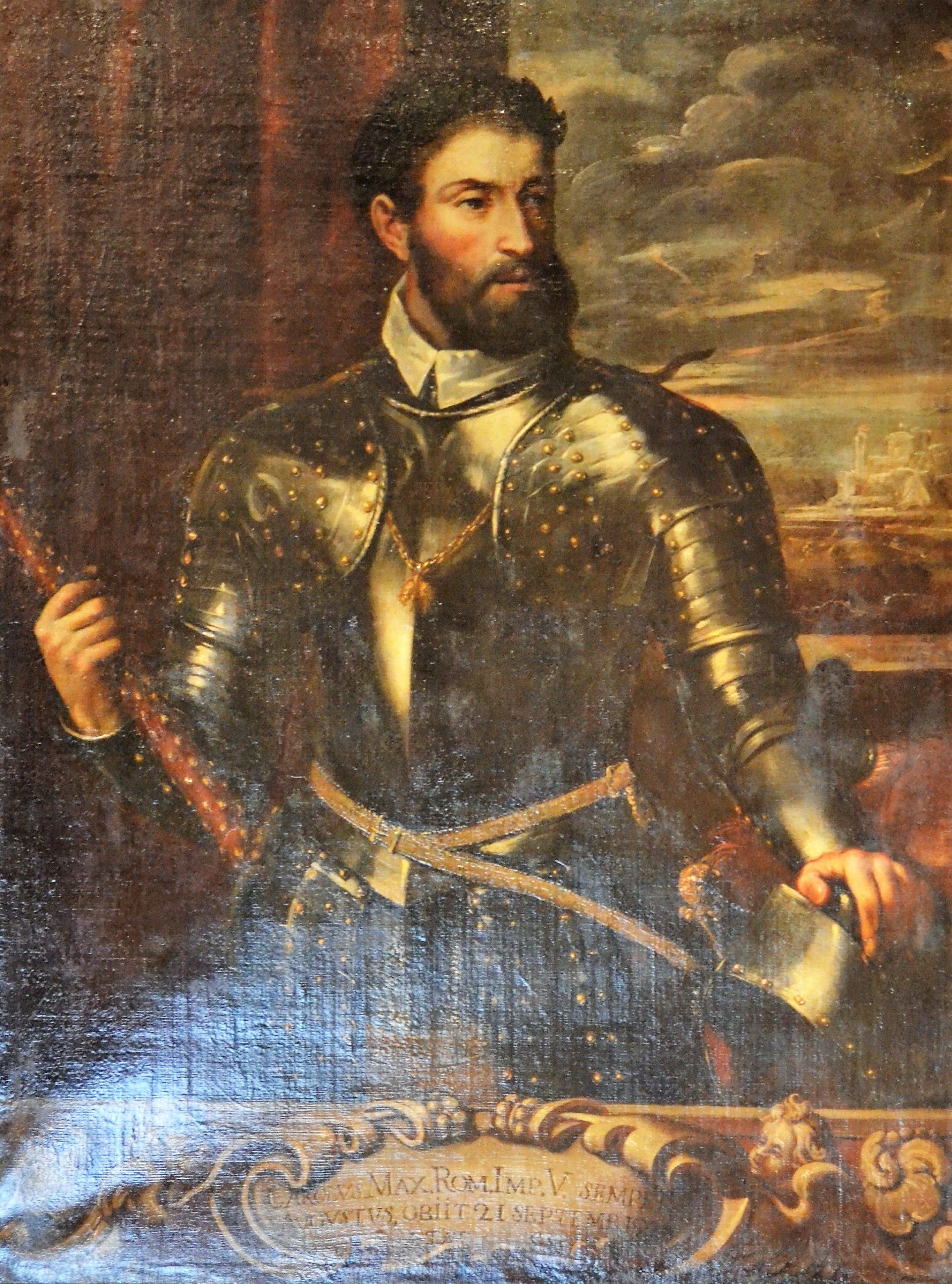 Ritratto di Carlo V, Valencia. Ritaglio da: file:Retrat de Carles I de València, palau de la Generalitat de València.jpg